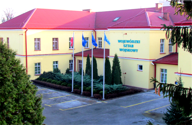 budynek